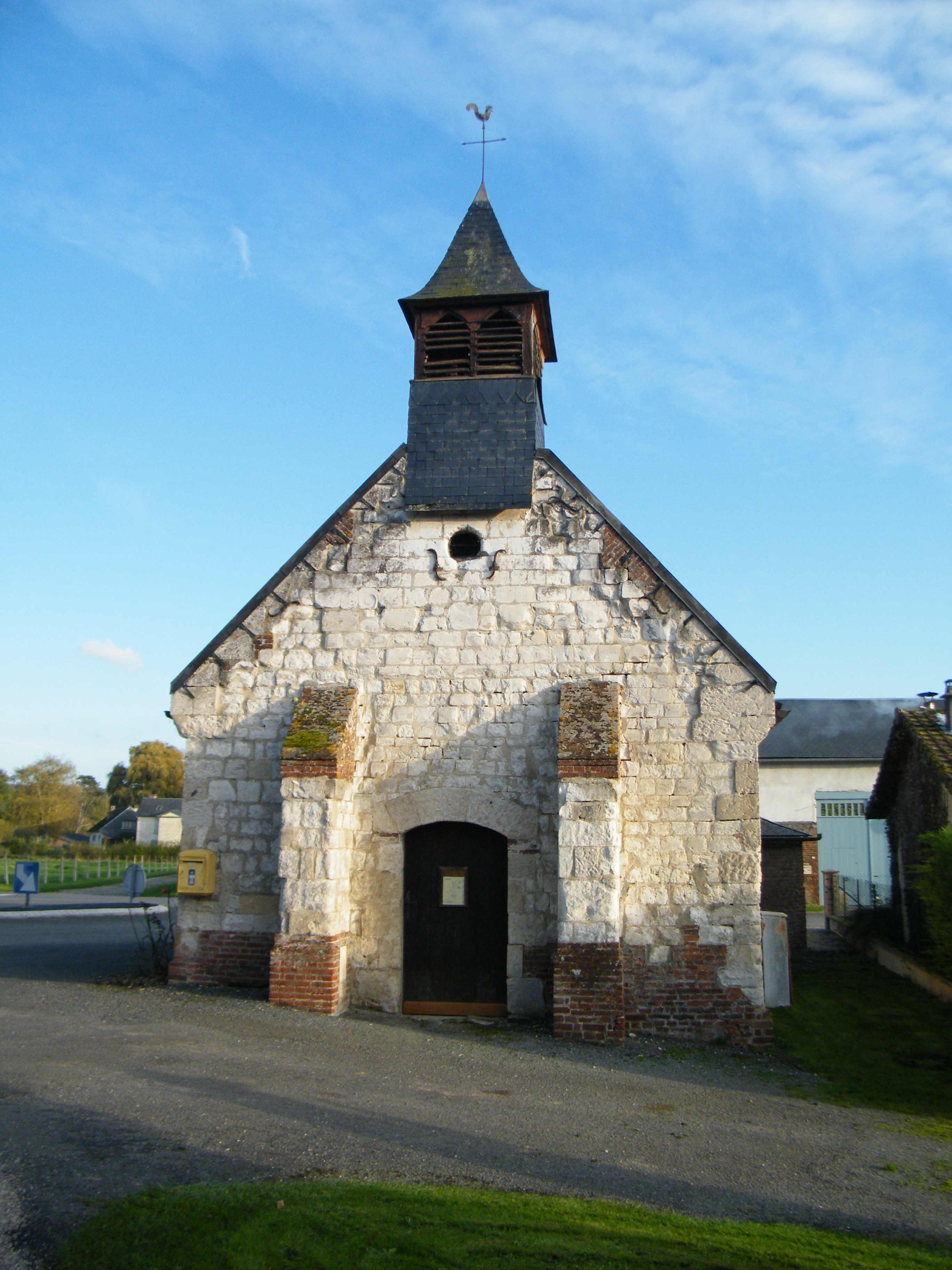 L'église.